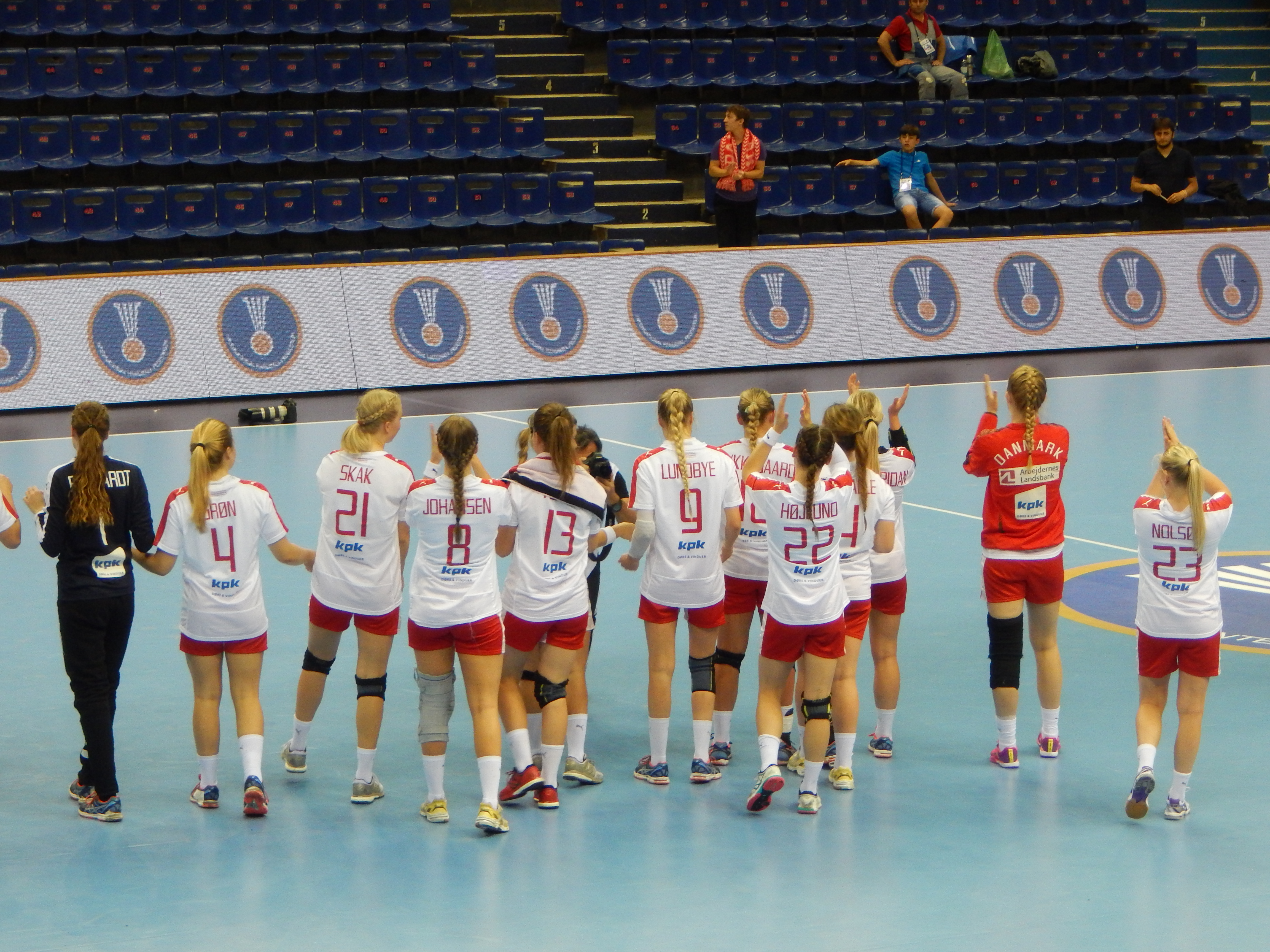 Чемпионат мира по гандболу среди девушек до 20 лет. Групповой этап, группа A. Матч Черногория - Дания